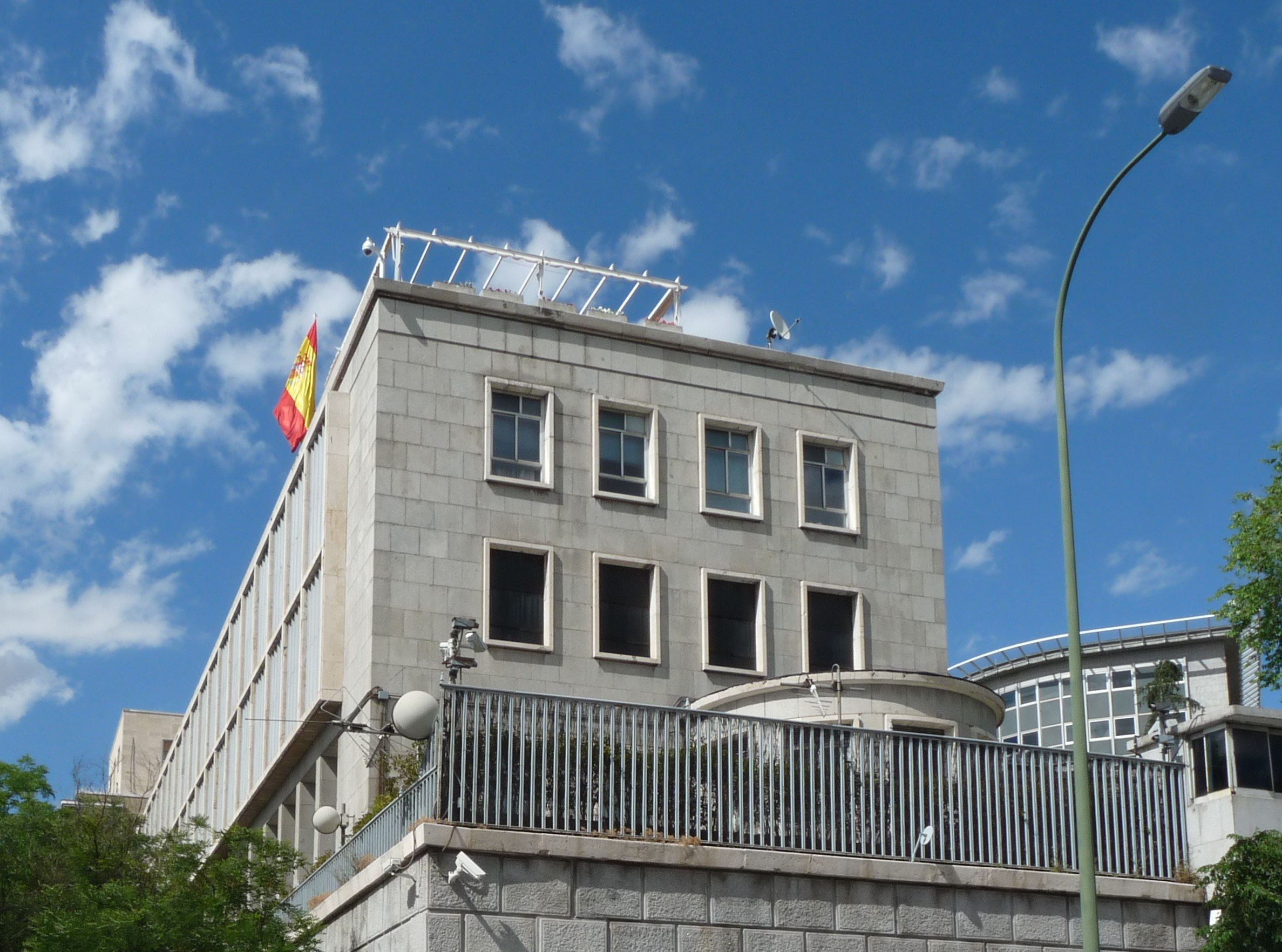 Edificio del Alto Estado Mayor, paseo de la Castellana, Madrid, España.